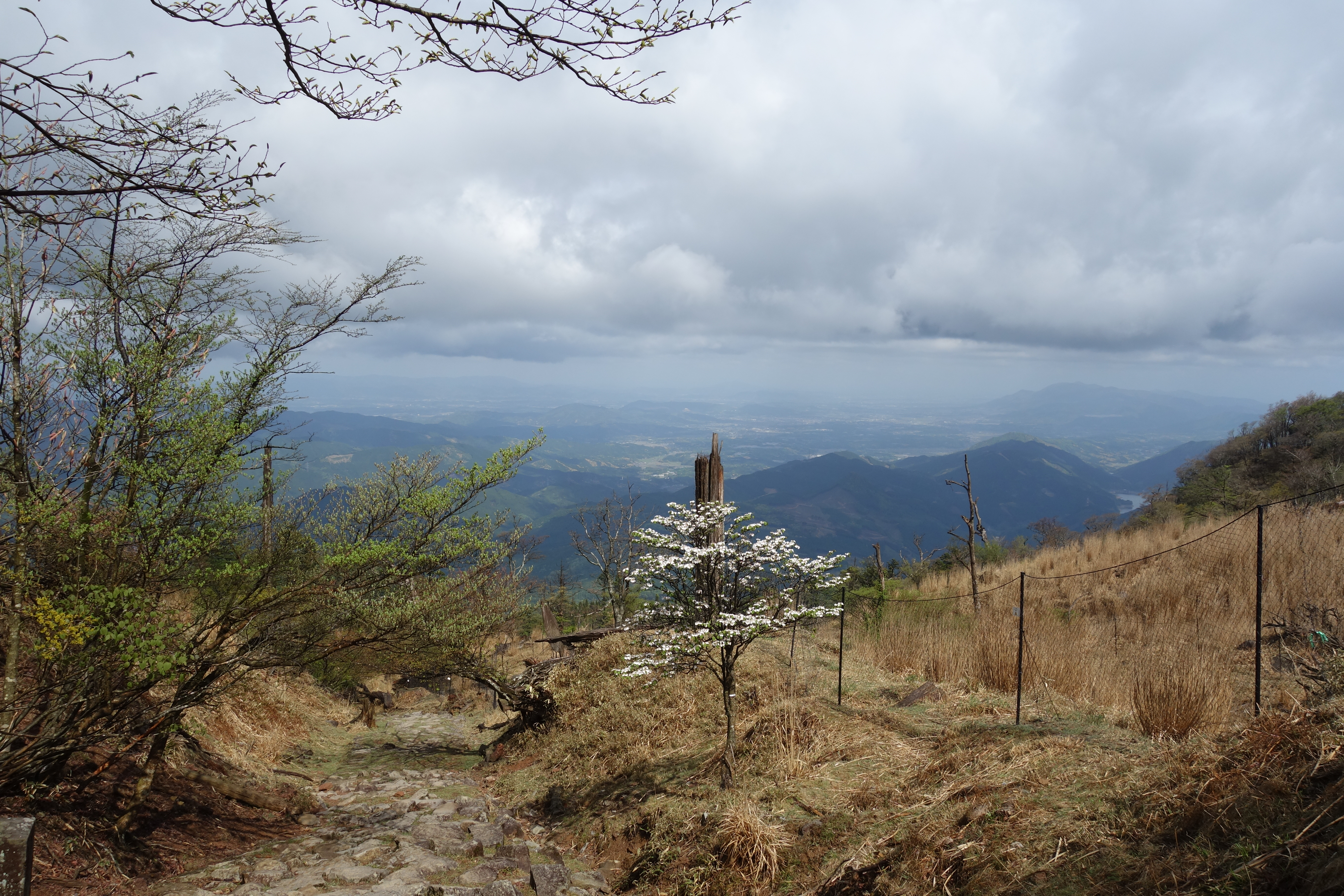 英彦山から福智山（右奥）を眺める